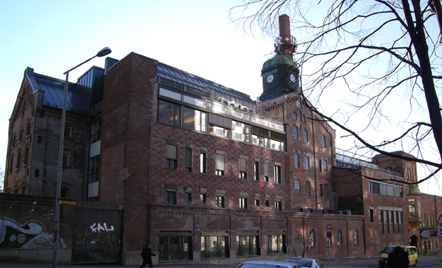 Former Ringnes brewery, Oslo.